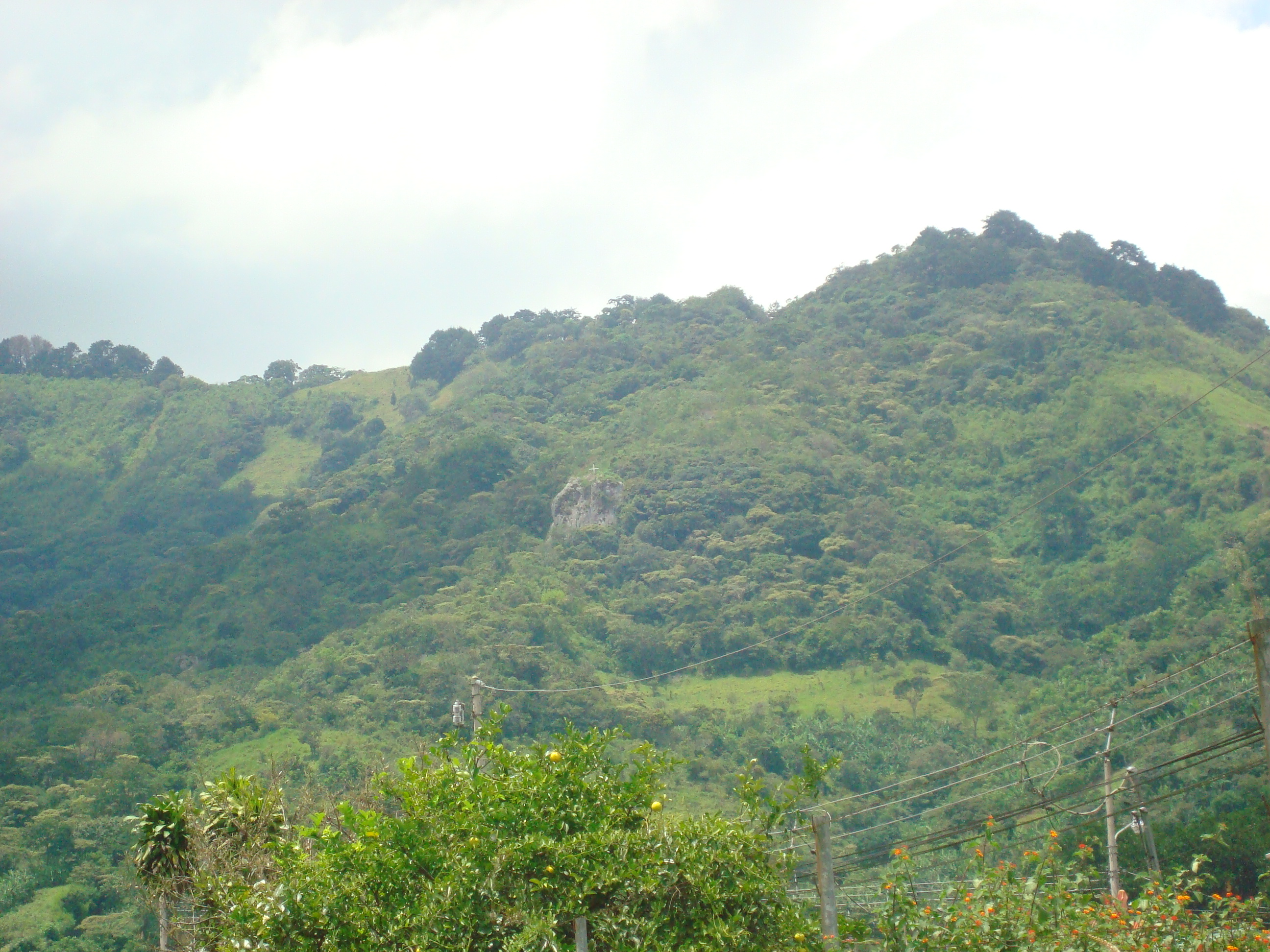 La piedra de Aserrí es una formación geológica que sobresale en los cerros de Bustamante, en el cantón de Aserrí, al sur de San José, Costa Rica. Es famosa como destino de paseos y sobre ella pesa la leyenda de la Bruja Zárate, que se dice habita en una cueva bajo la gran roca.